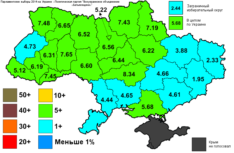 Результаты выборов в Верховную Раду Украины, которые состоялись 25 октября 2014 года. Информация с официального сайта ЦИК. Проценты по регионам для партии "Батькивщина".